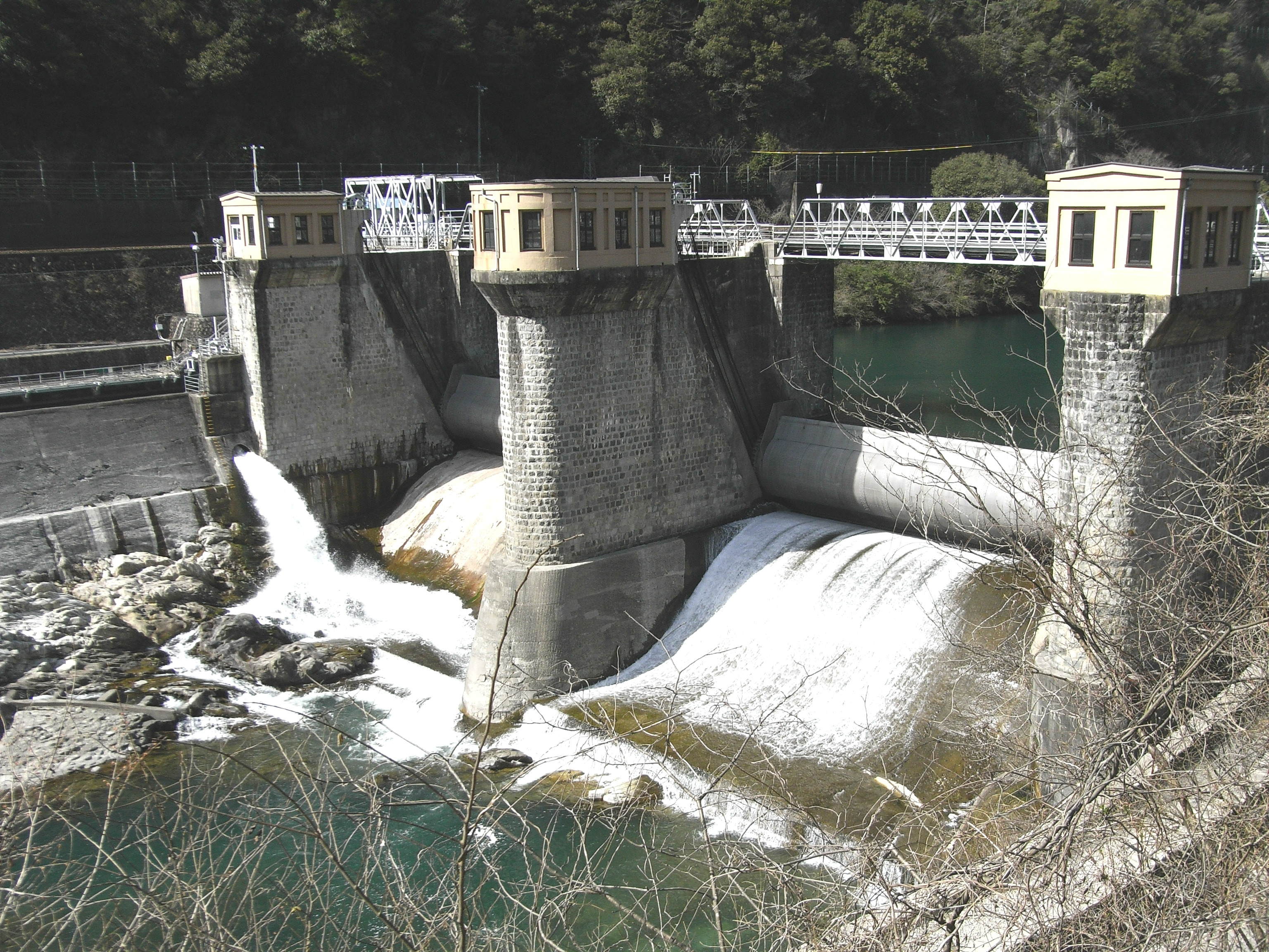 Dam